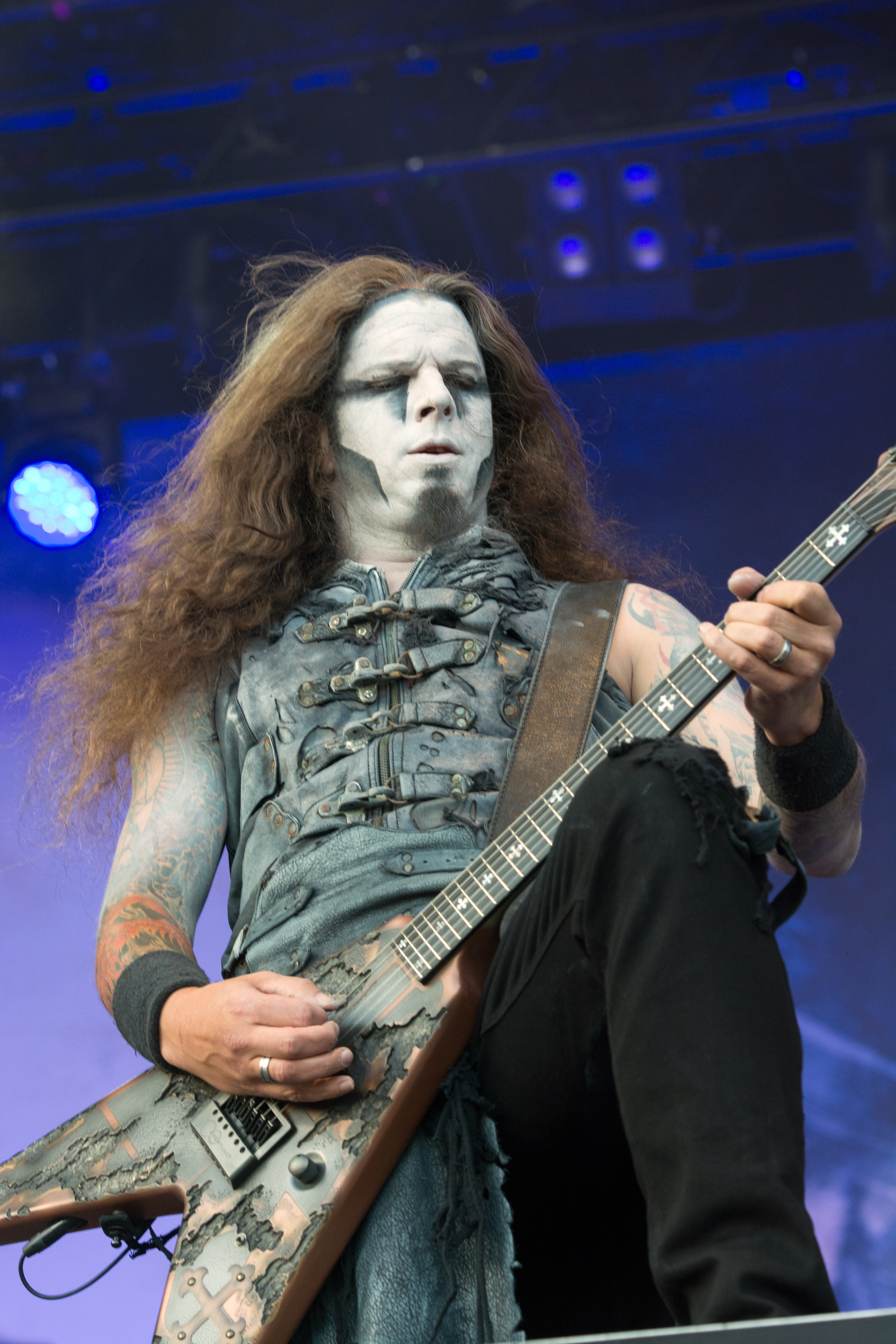 Powerwolf beim Elbriot 2016